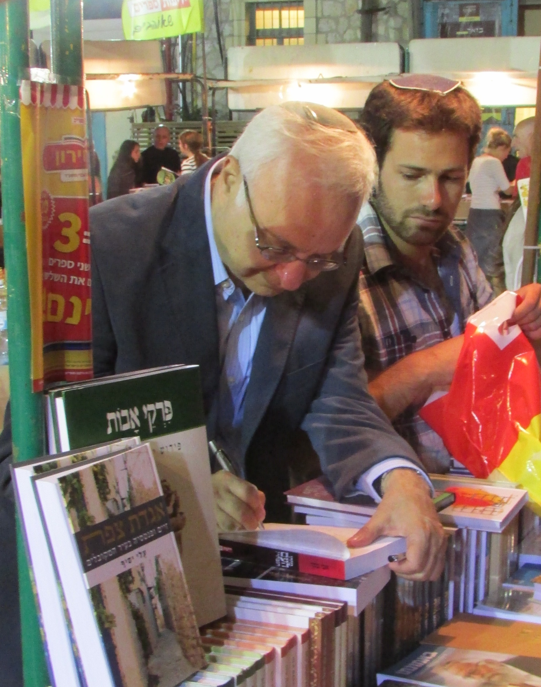 Avi Beker at Jerusalem Hebrew book week fair